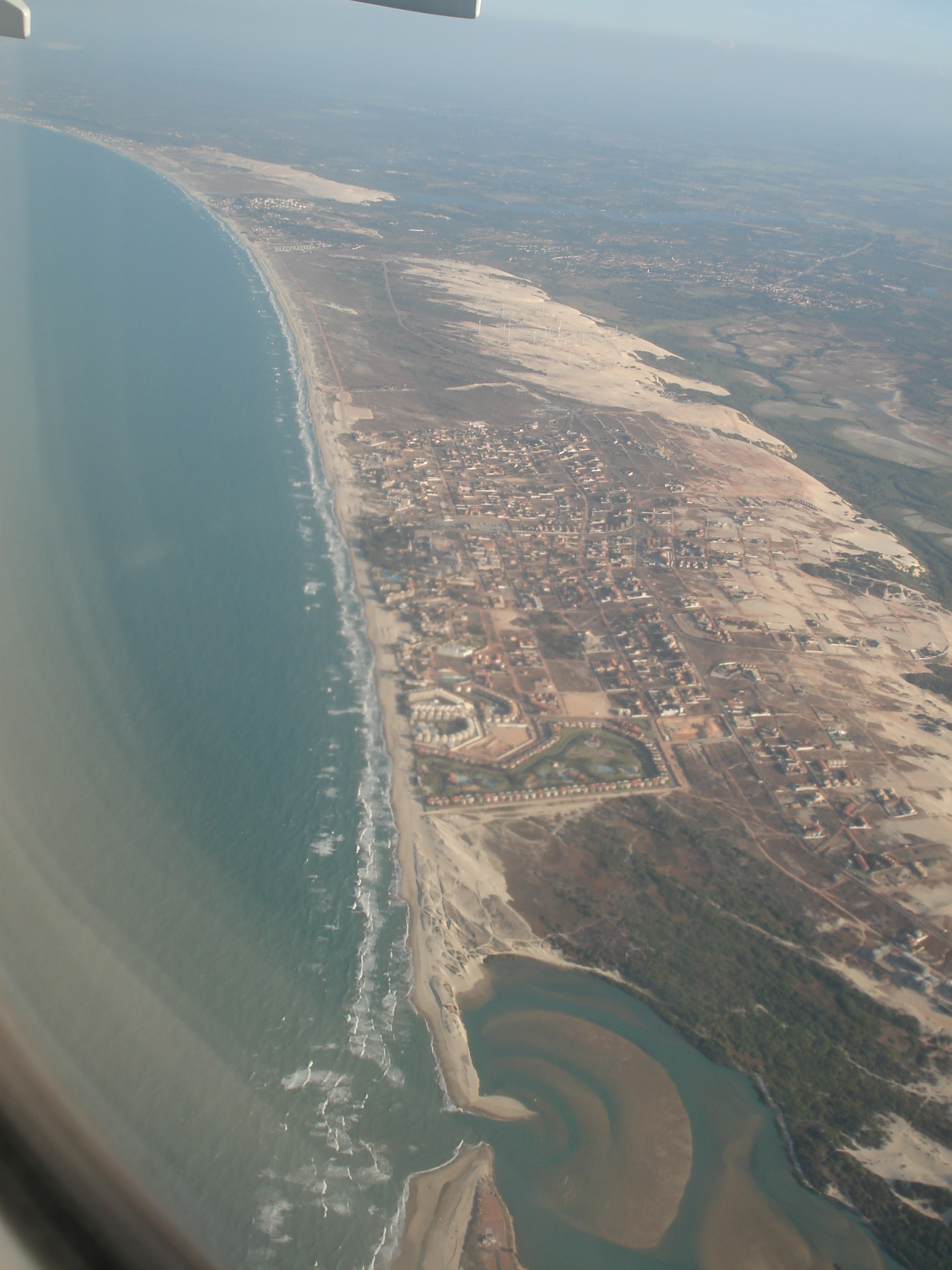 Arredores do Beach Park